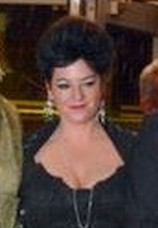 Lynne Ramsay at the Cannes Film Festival